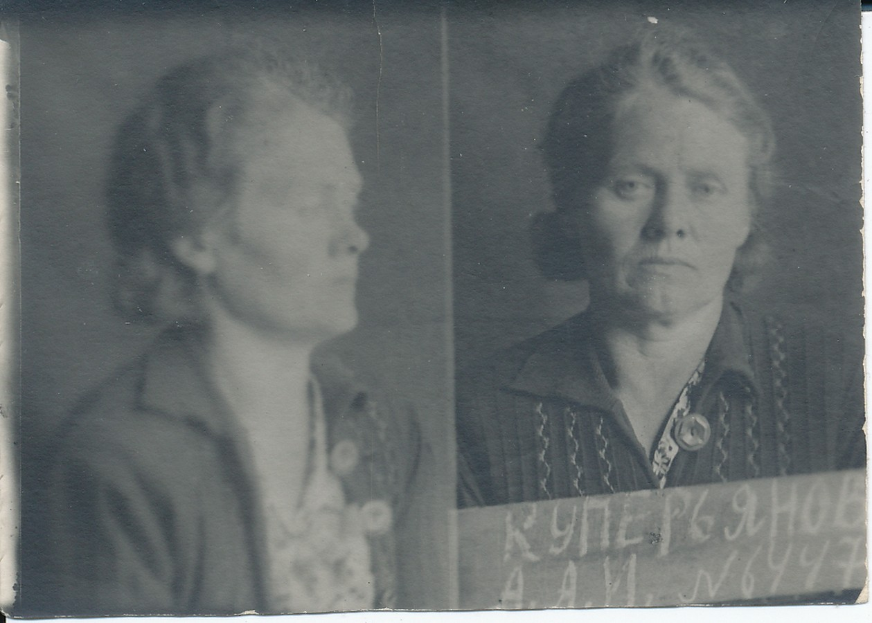 NKVD foto arreteeritud Alice Kuperjanovist